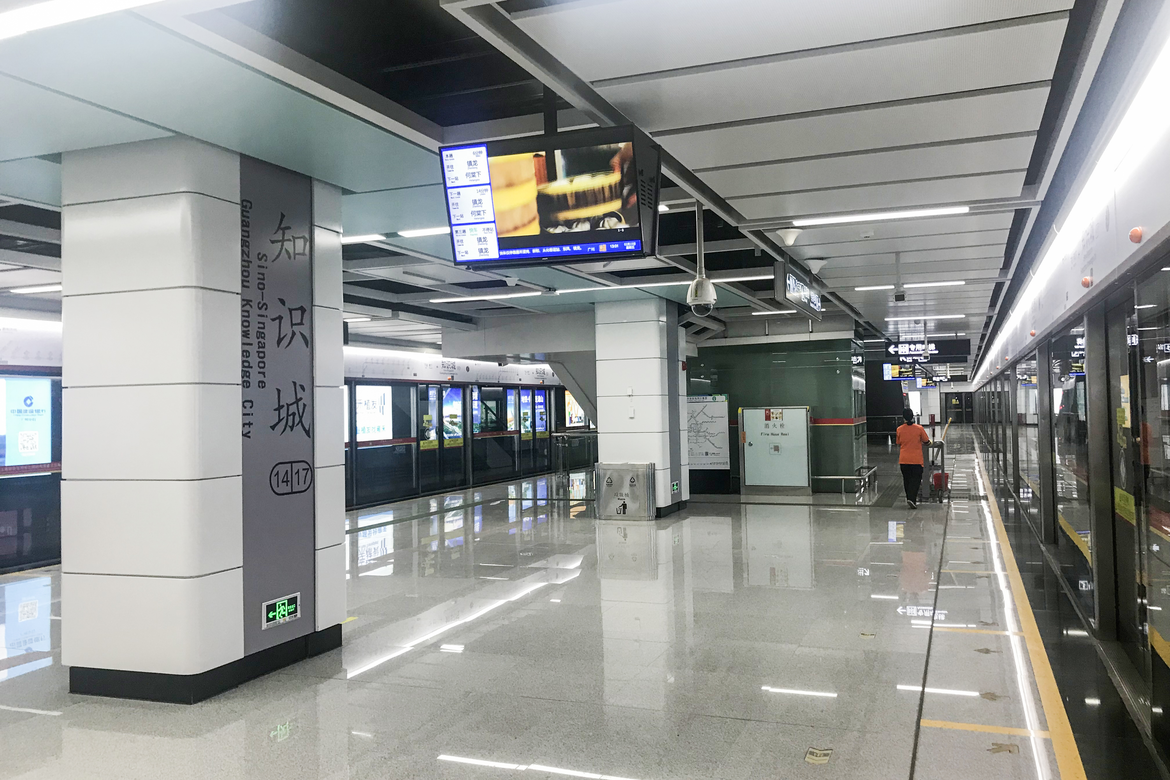 广州地铁知识城站